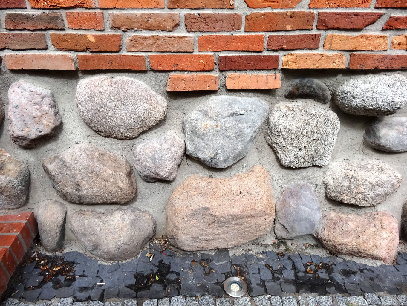 Relikty murów miejskich w Bydgoszczy przy ul. Pod Blankami